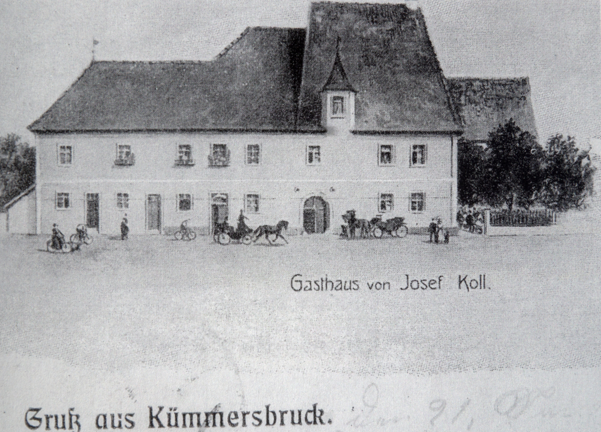 AK - Kümmersbruck - ehemaliges Hofmarkschloß - Schloßwirtschaft: "Gasthaus von Josef Koll - Gruss aus Kümmersbruck"